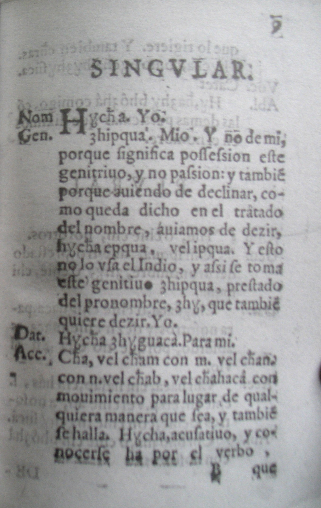 Página 9 de la Gramática de Lugo